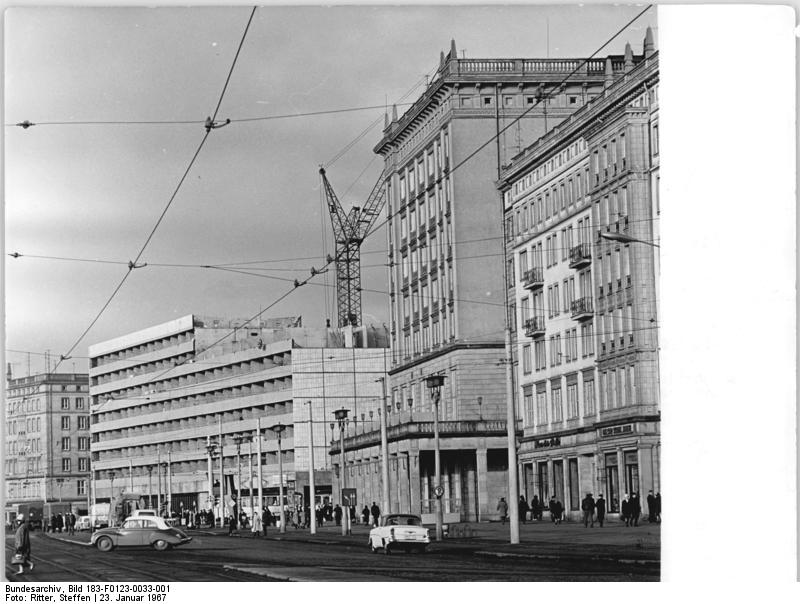 Magdeburg, Wilhelm-Pieck-Allee, Wohnblock im Bau Zentralbild Ritter 23.1.1967 Magdeburger Neubauten: Ein neuer Wohnblock mit 320 Wohnungen ensteht gegenwärtig im Zentrum der Elbestadt. Damit ist in der Wilhelm-Pieck-Allee die letzte Lücke geschlossen worden.